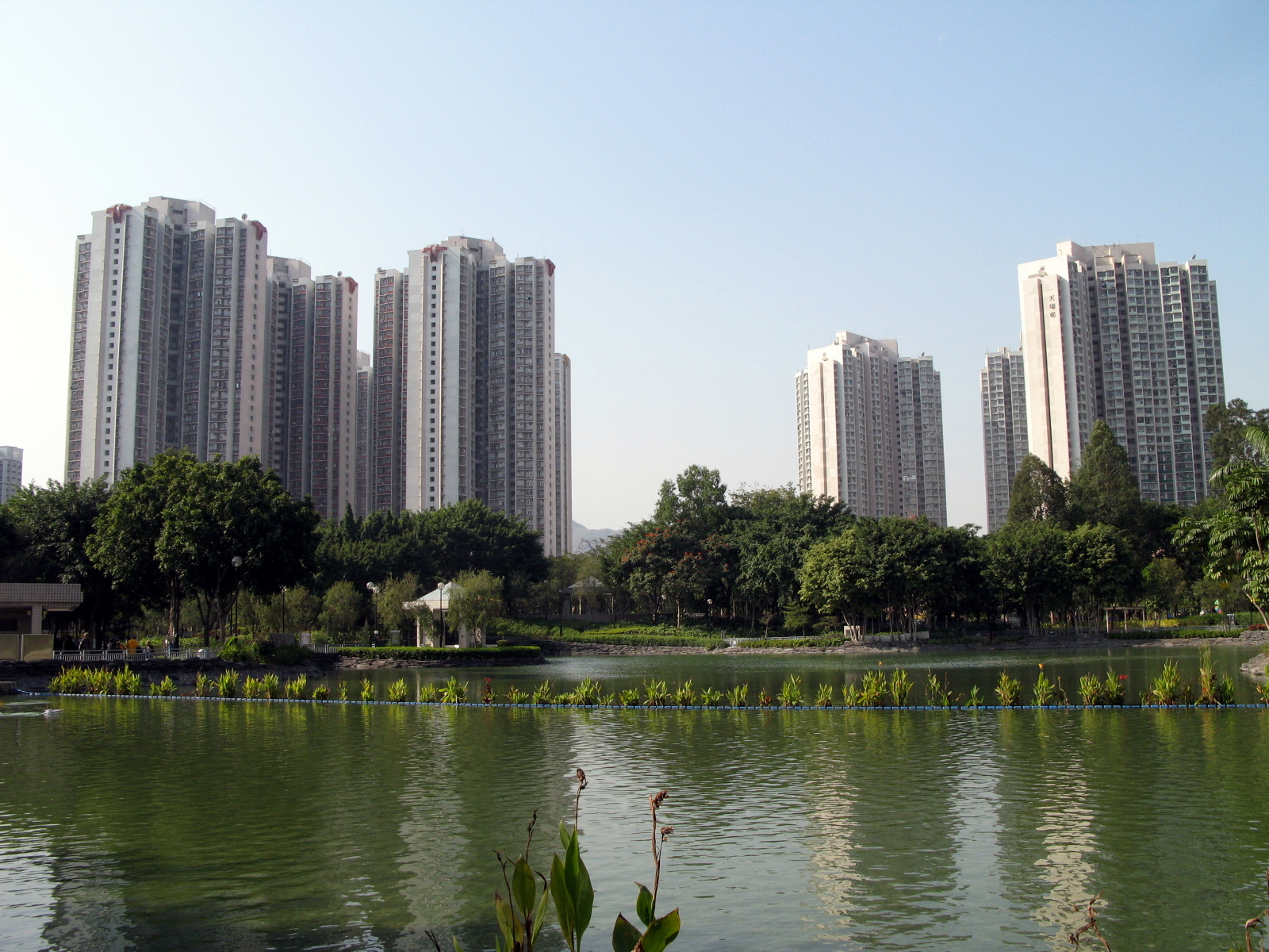 Tin Shui Estate in Tin Shui Wai